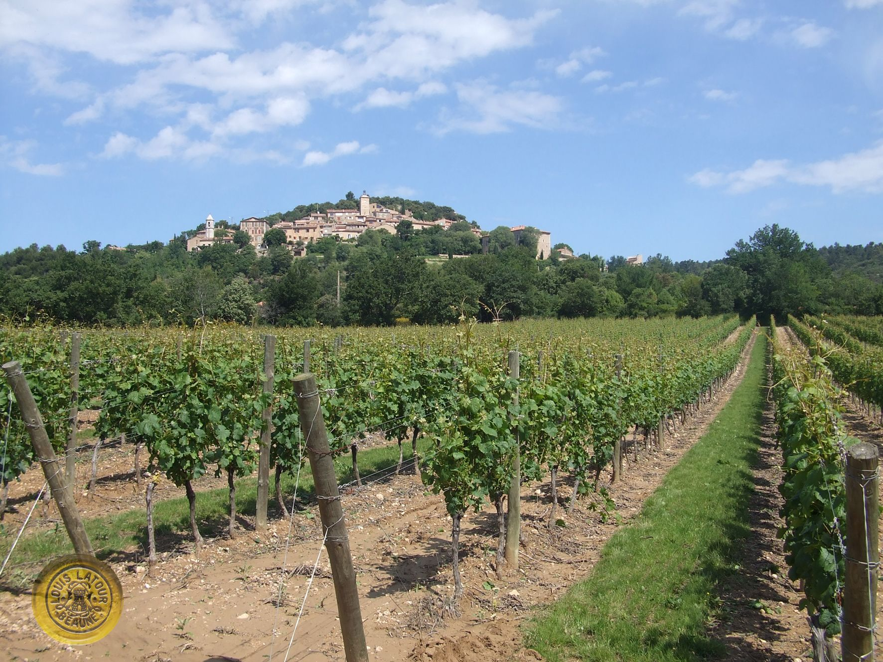 Domaine de Valmoissine - Louis Latour